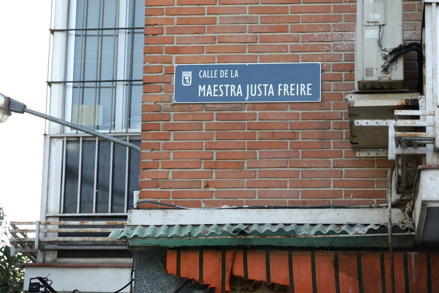 El Ayuntamiento de Madrid ha comenzado hoy, 26 de abril, a cambiar las placas del callejero franquista, tras el auto del Tribunal Superior de Justicia de Madrid (TSJM) que desestimaba las medidas cautelares solicitadas por la Fundación Francisco Franco contra el acuerdo adoptado por la Junta de Gobierno en mayo pasado, siguiendo la propuesta realizada por el Comisionado de la Memoria histórica en su informe definitivo. De esta forma el Ayuntamiento, tras la desestimación por la Justicia de dichas medidas, inicia la ejecutividad del acuerdo como es preceptivo legalmente.